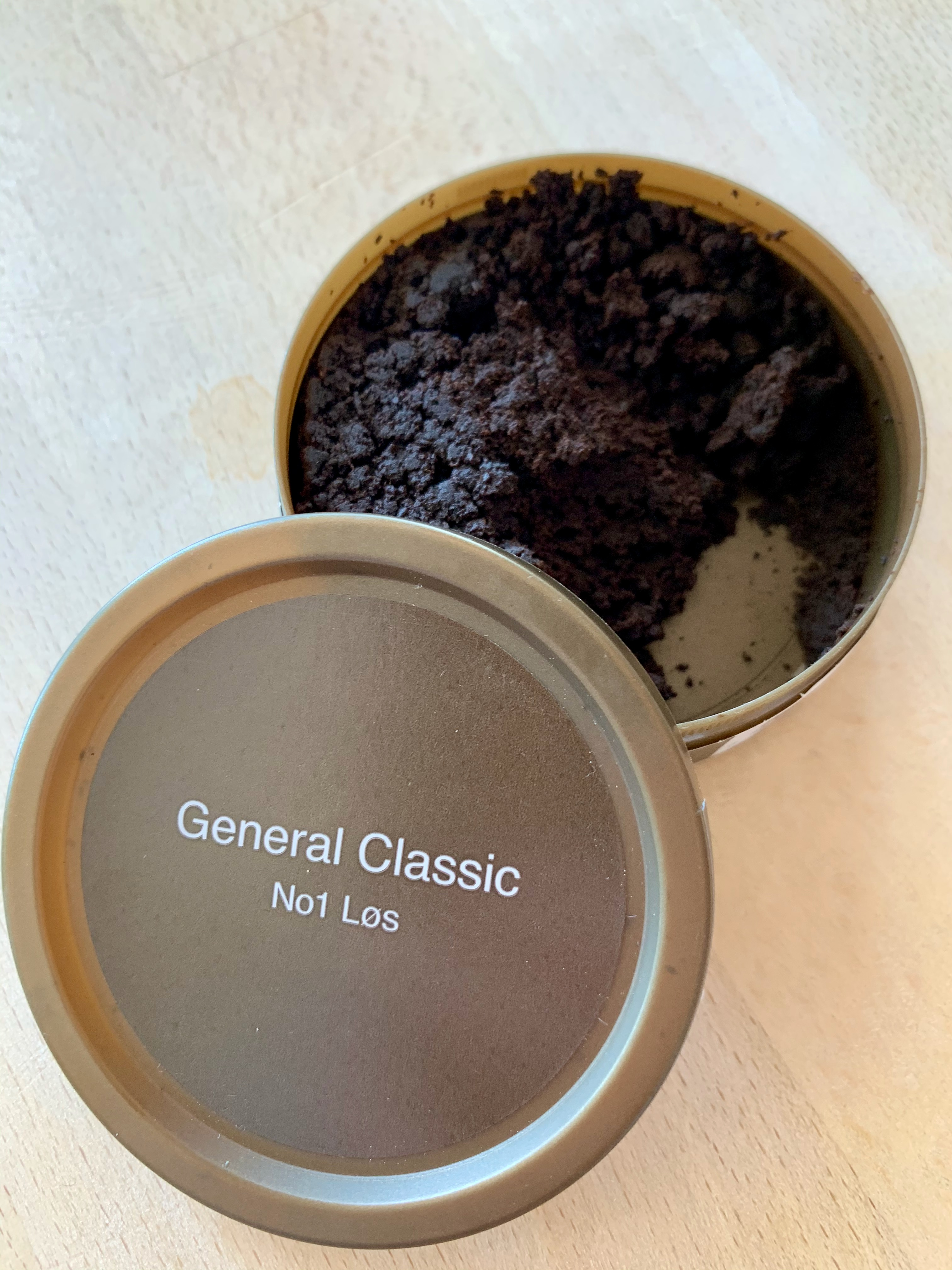 Snusboks, General Classic No1 Løs